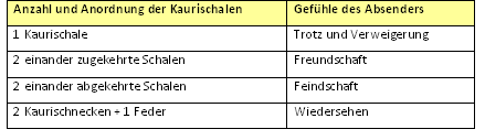 Die Bedeutung der Kaurischnecken bei der Überbringung von Botschaften (nach Quelle: Schilder 1952, S. 39).